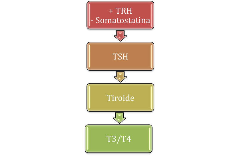 Regulació hormonal de la tiroide.